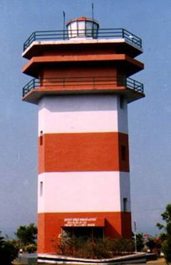 മൗണ്ട് ദില്ലിയിലെ വിളക്കുമാടം